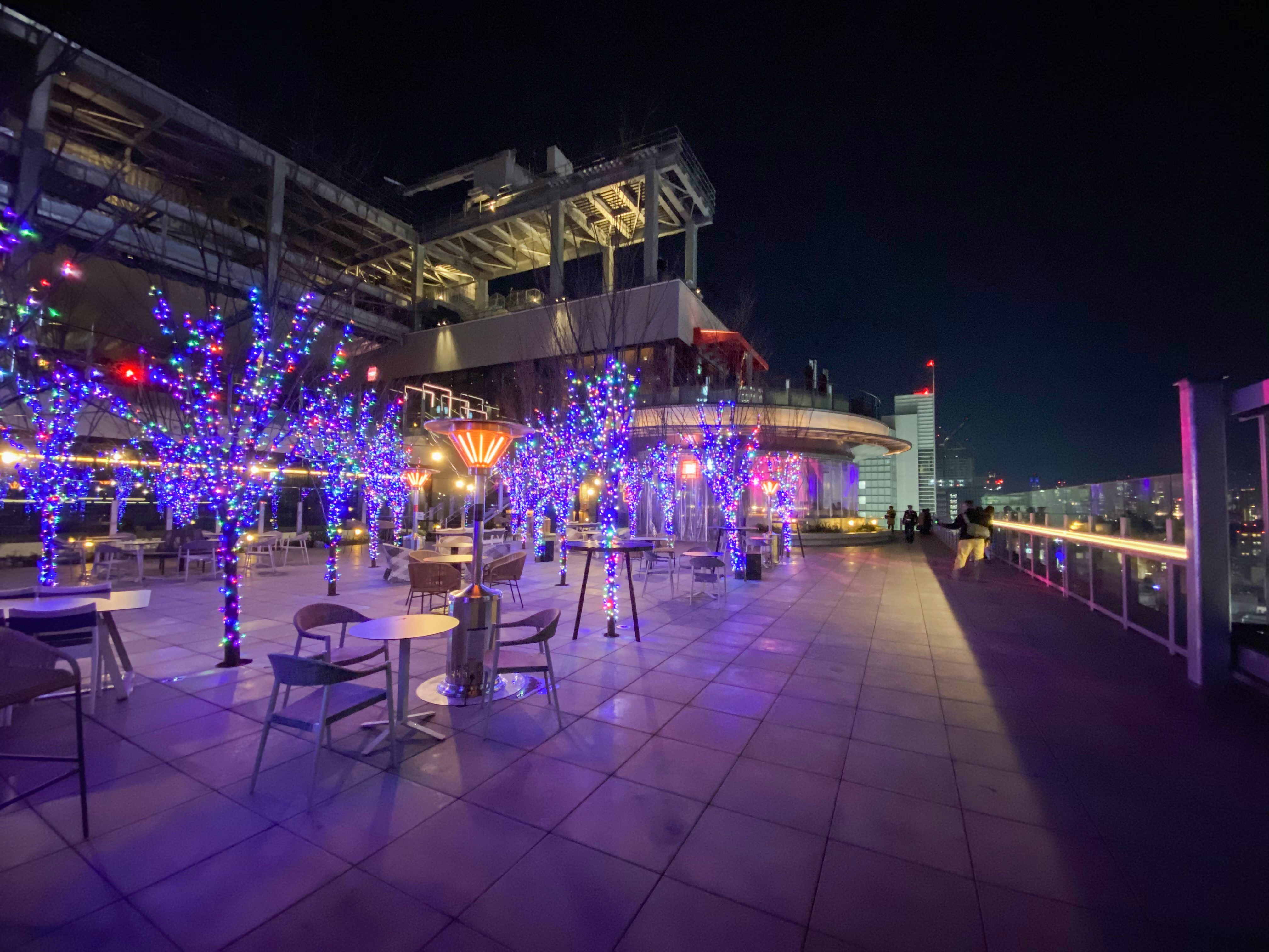 Fukuras 17F Roof garden night view